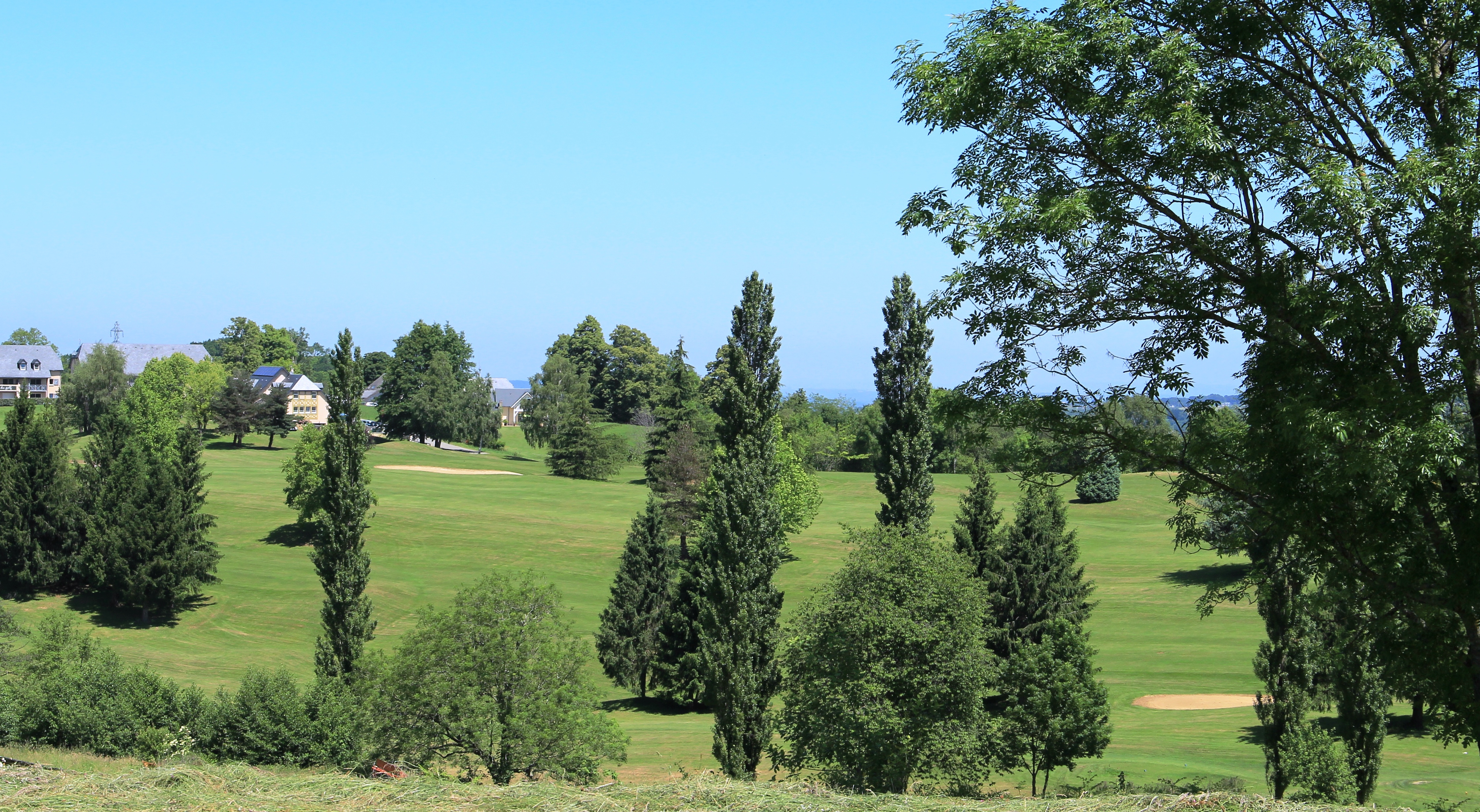 Golf de Bagnères-de-Bigorre (Hautes-Pyrénées)